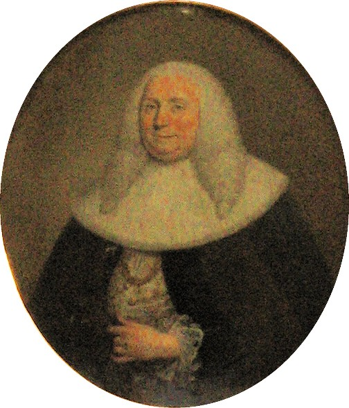 Heinrich Brockes II. (* 15. August 1706; † 12. Juni 1773), Bürgermeister von Lübeck. Epitaph-Porträt